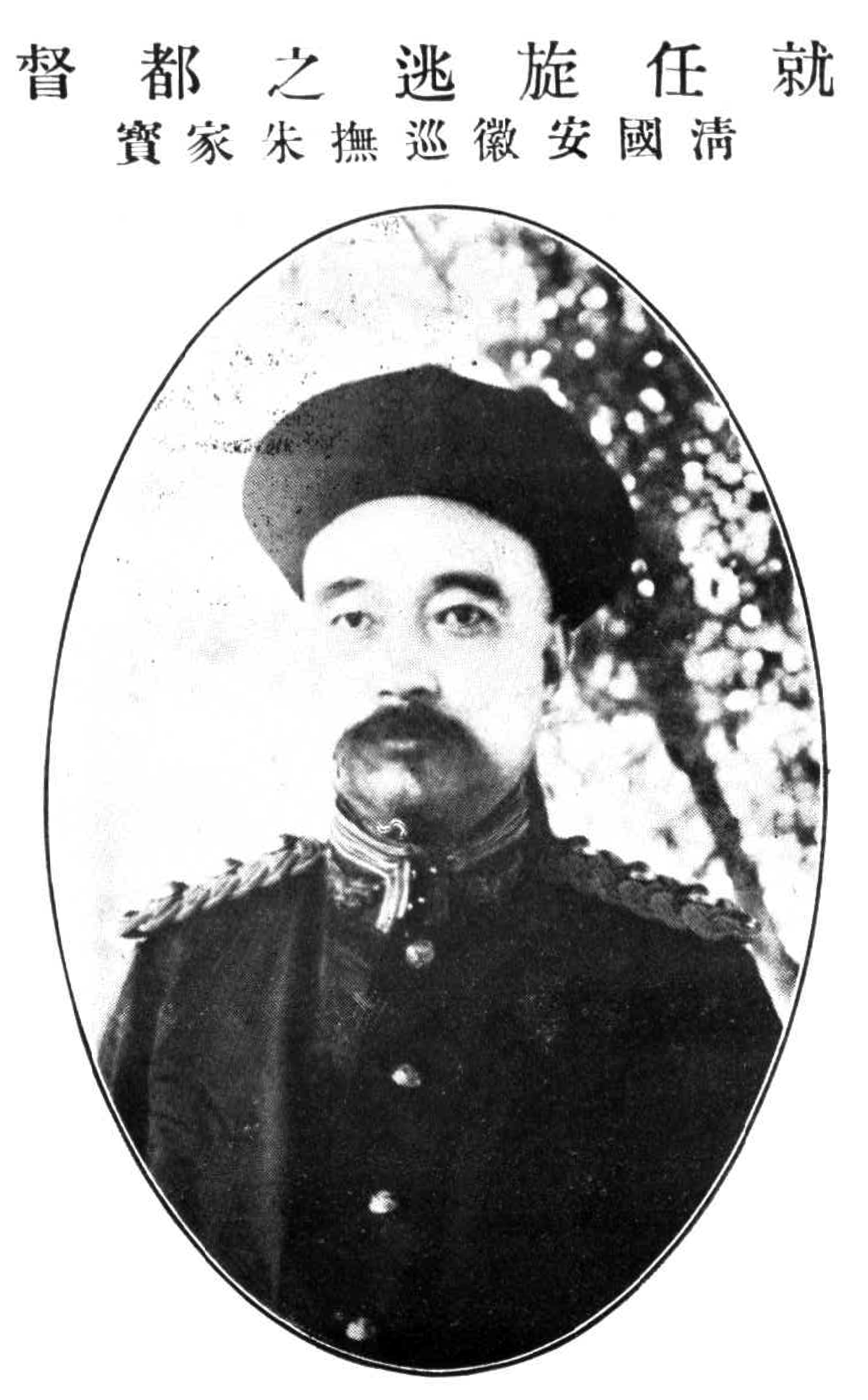 吉林、安徽巡抚，朱家宝